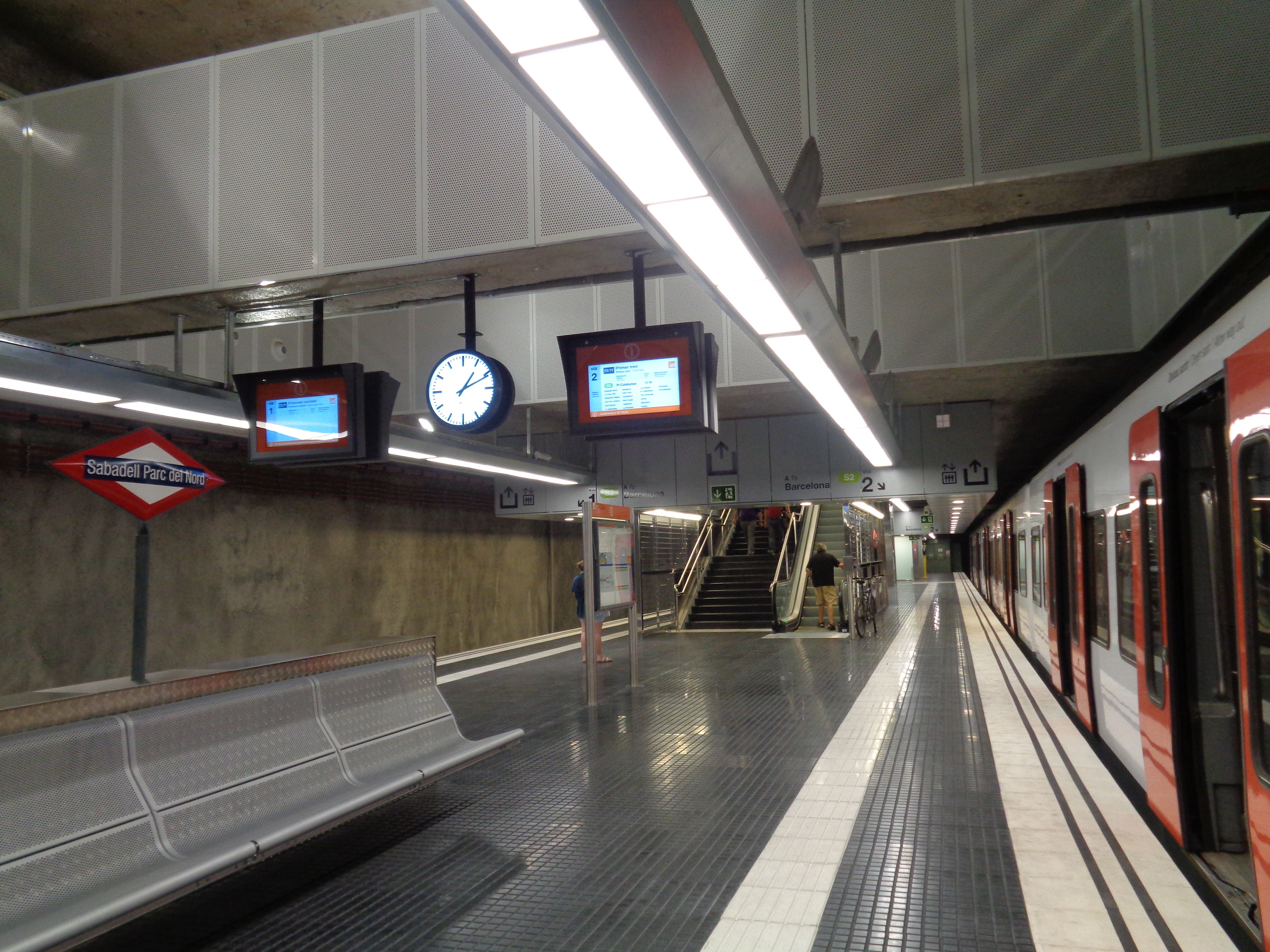 Estació de Sabadell Parc del Nord a Sabadell.